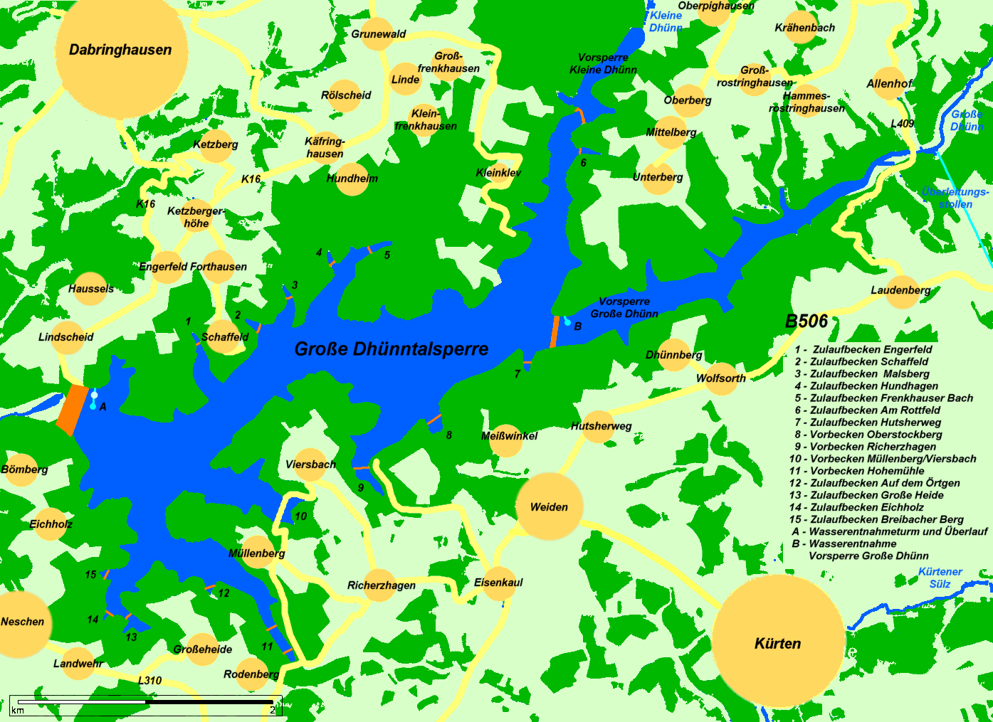 Karte Große Dhünntalsperre